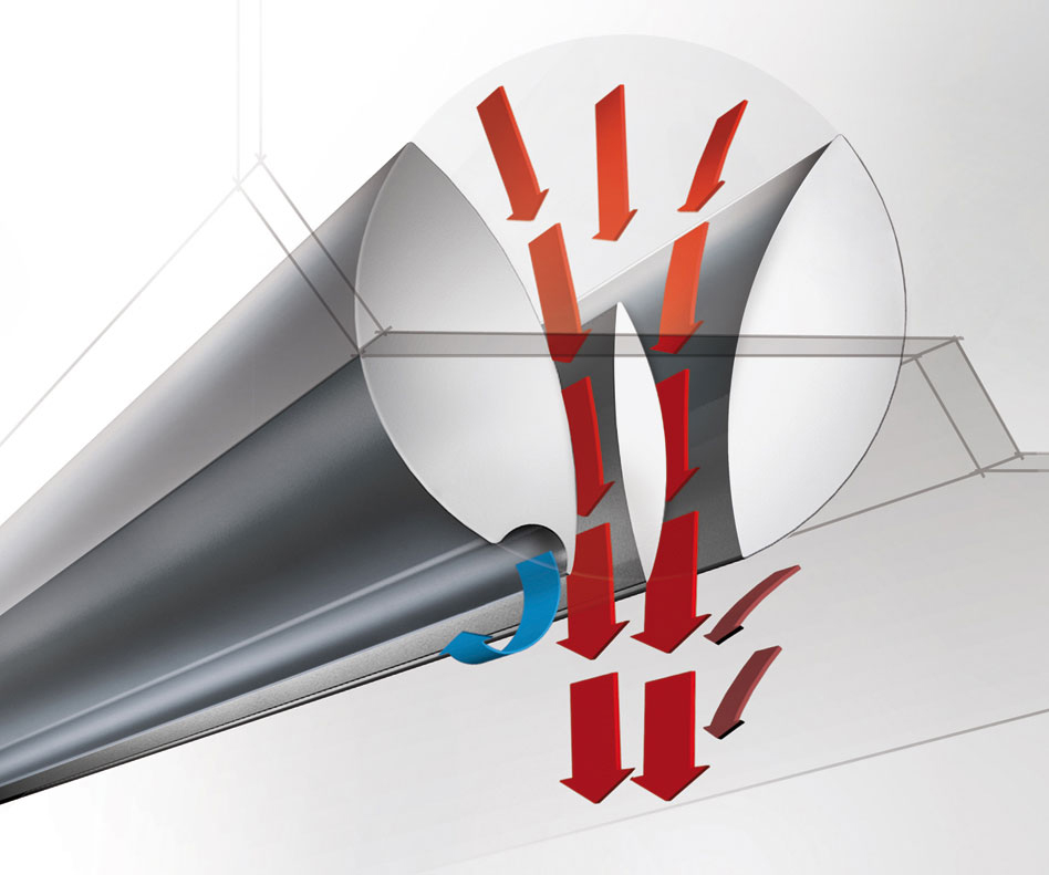 Das Prinzip der CONVERGO-Düse